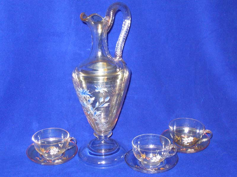 Kandeelstel (zelfgemaakte foto)